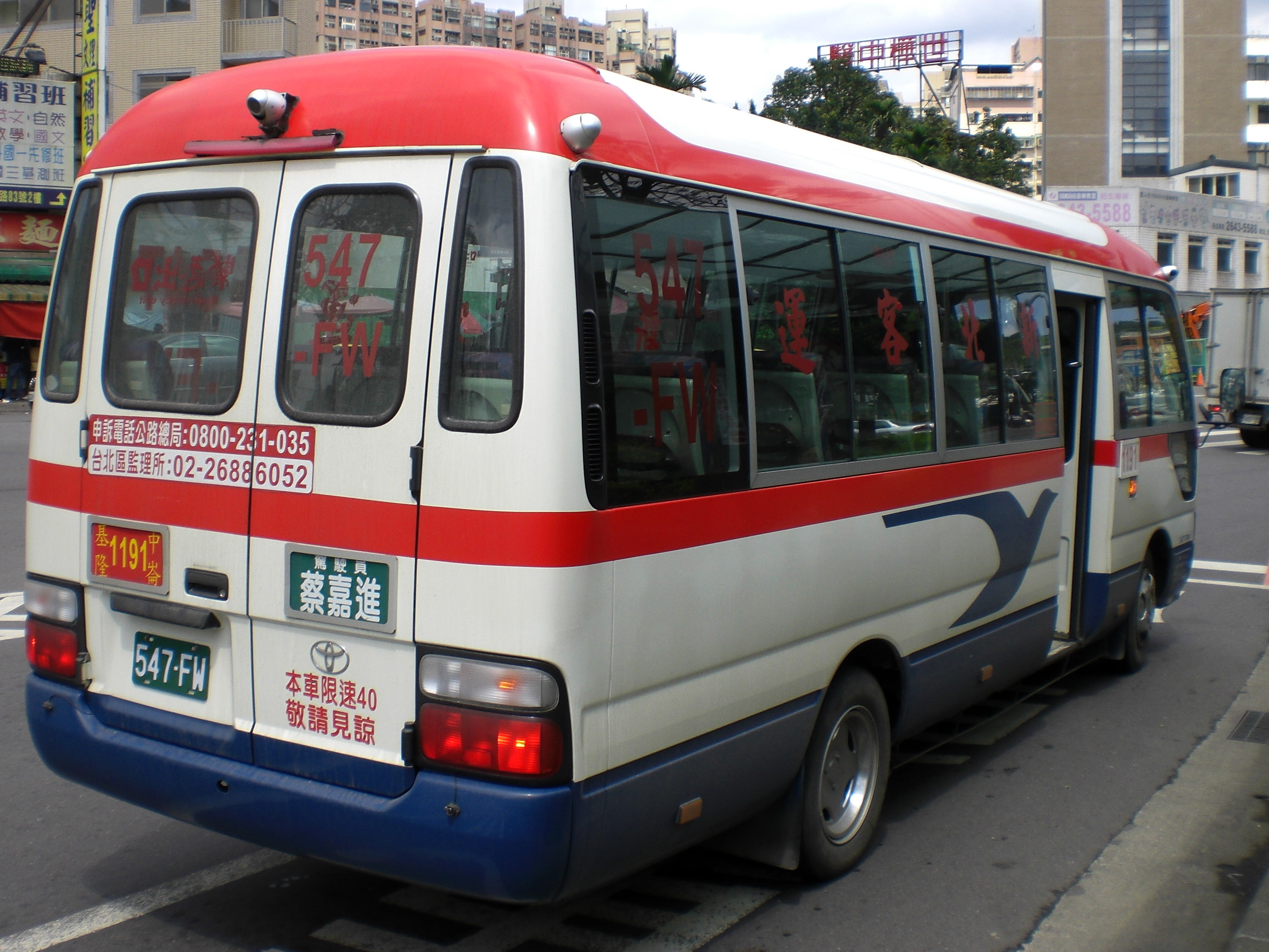 中文（台灣）: 新北客運豐田Coaster中巴547-FW右後方外觀